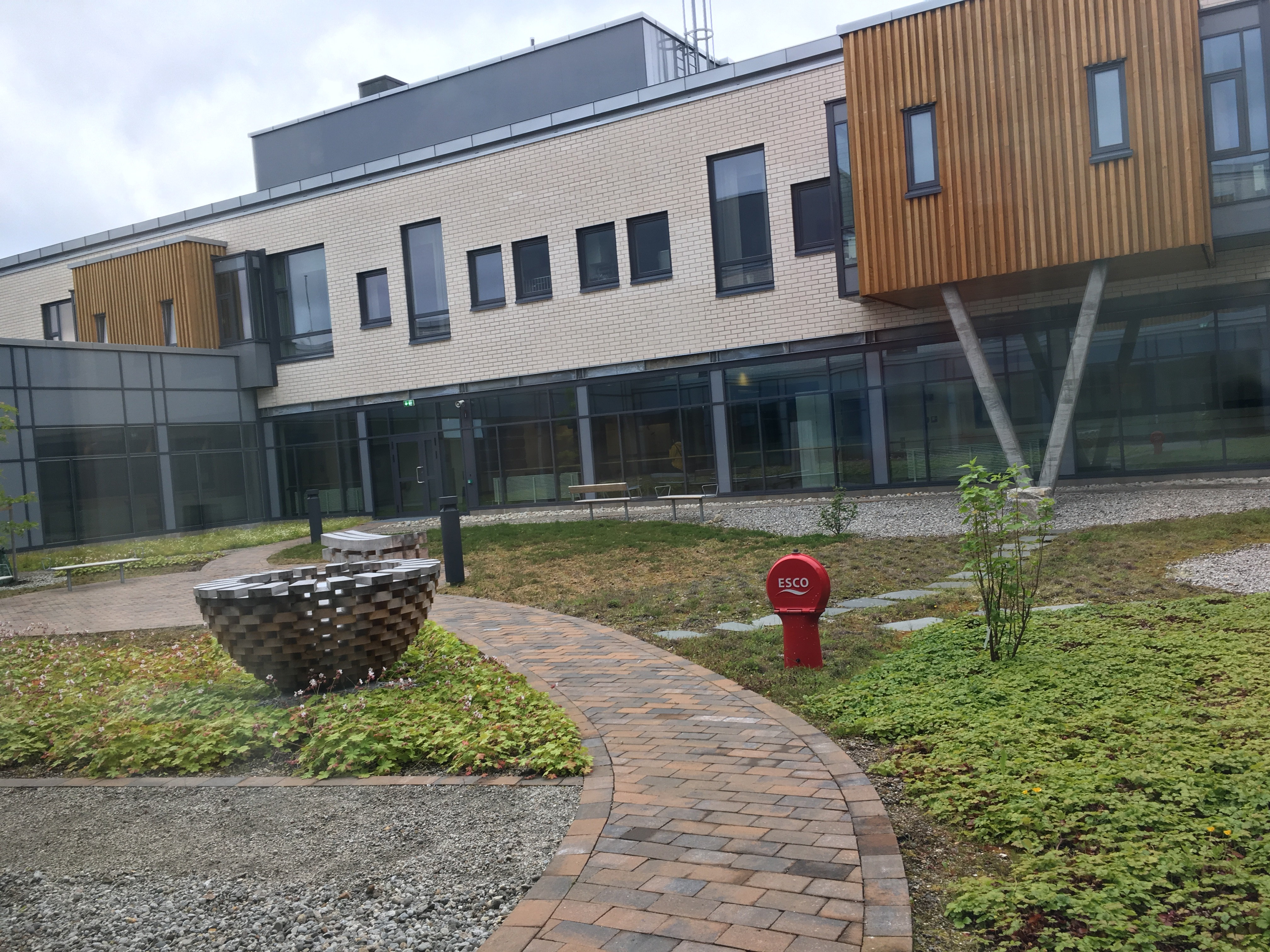 Nordlandssykehuset Vesterålen. Ferdigstilt 2014. Arkitekter: BOARCH arkitekter as